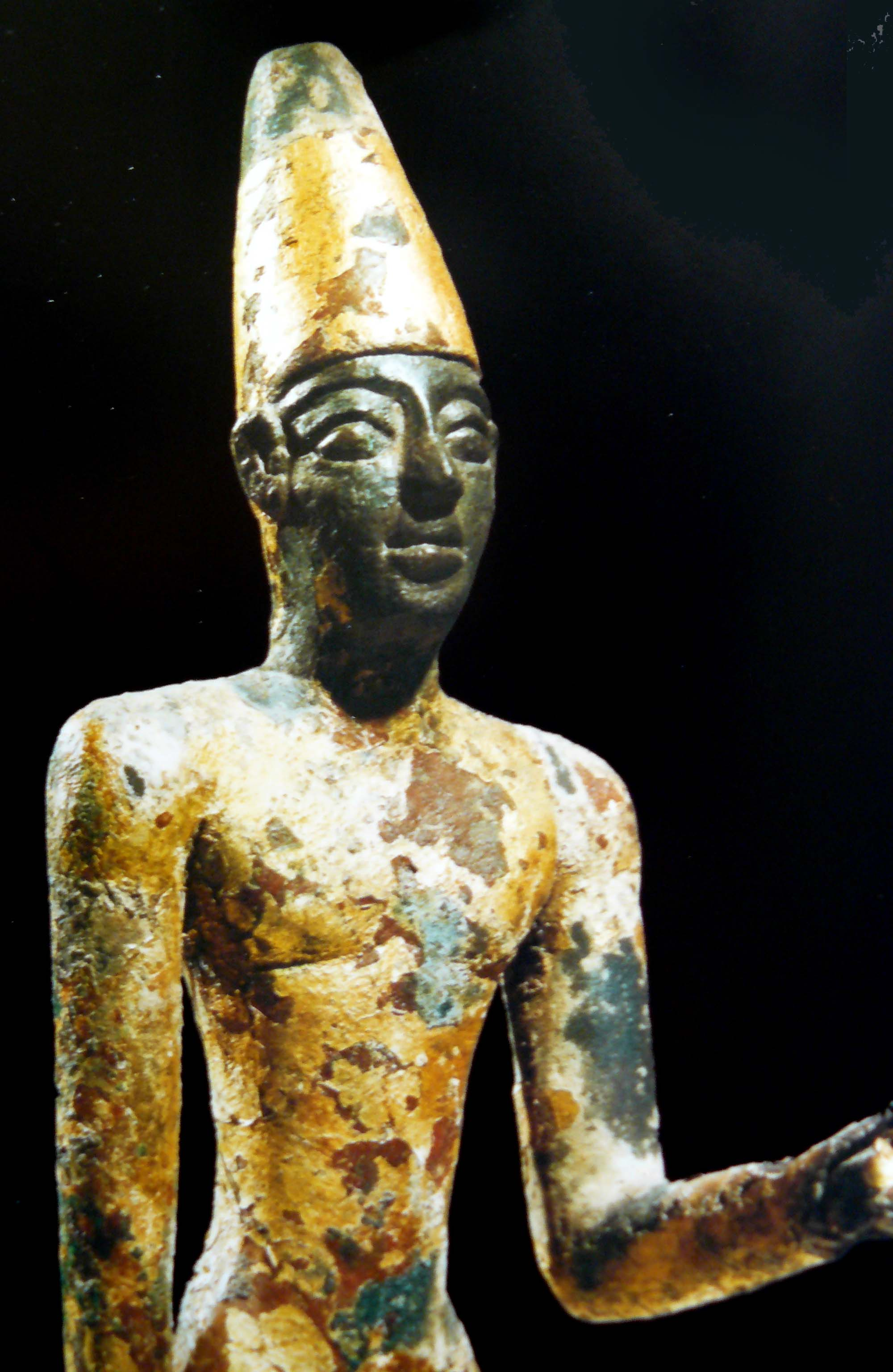 Statuette de reshep, Byblos, conservée au musée national de Beyrouth